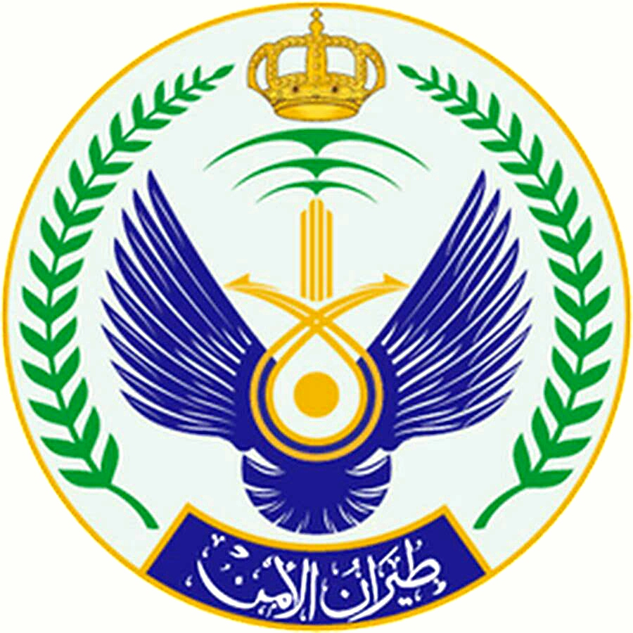 صورة شعار طيران الأمن